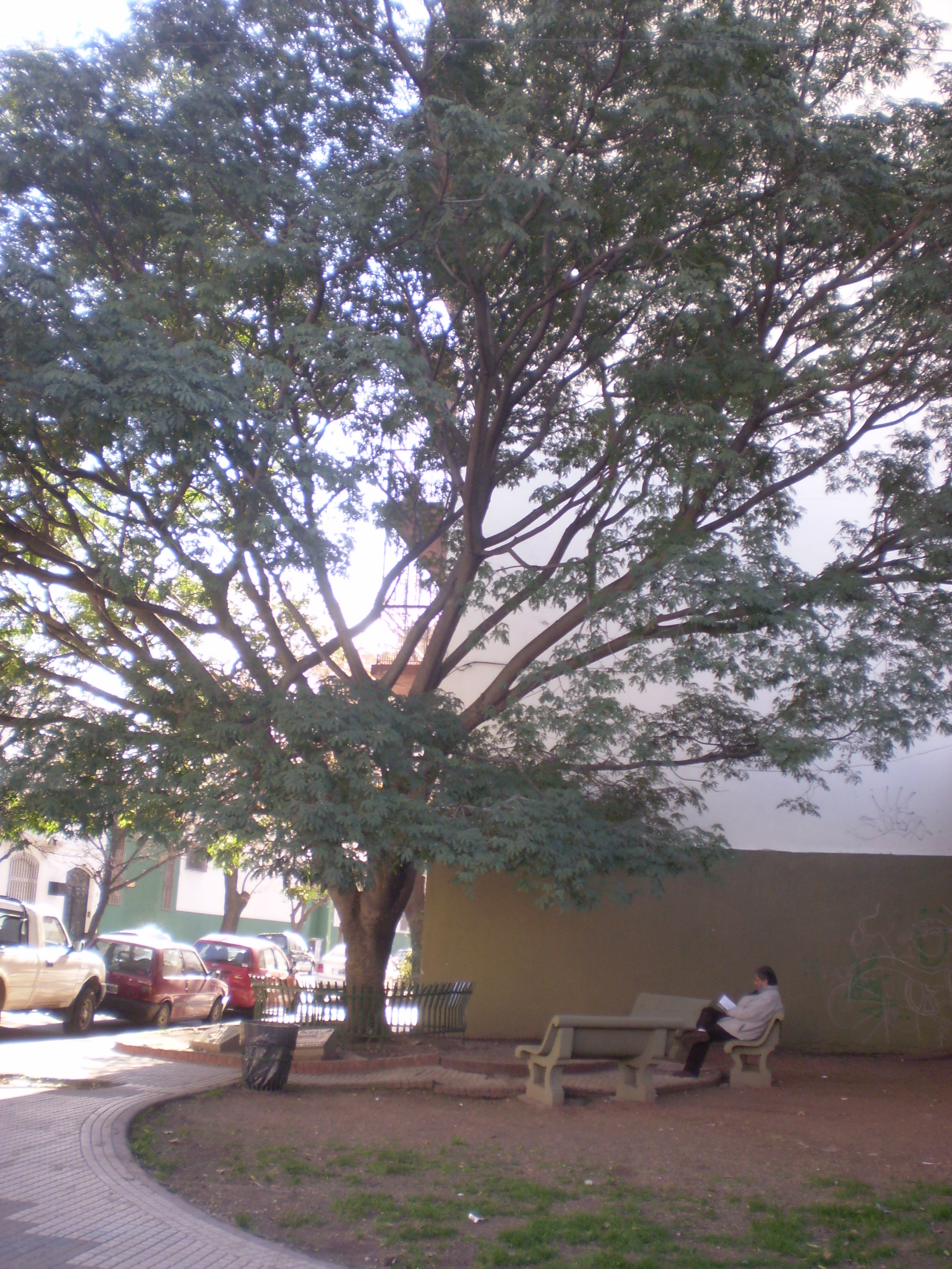 Retoño del Pacará de Segurola. A la sombra del pacará original, que fue removido en 1990, Saturnino Segurola aplicaba la vacuna antivariólica a la población, en forma gratuita. Esquina de Baldomero F. Moreno y Puán, Buenos Aires. El pacará original fue salvado del derribo por obra de Alfredo Palacios y otros, en 1939.